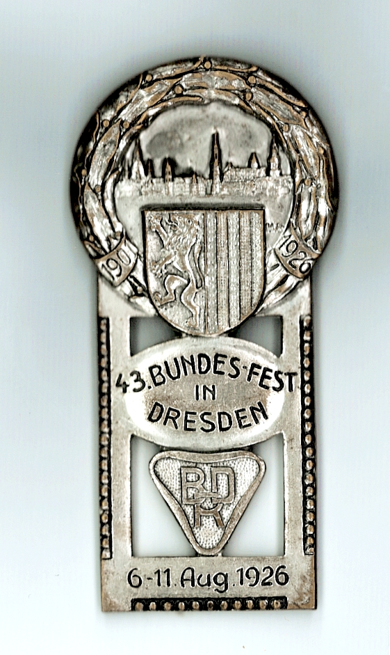 Bundesfest BDR Dresden 6.-11. August 1926, Plakette